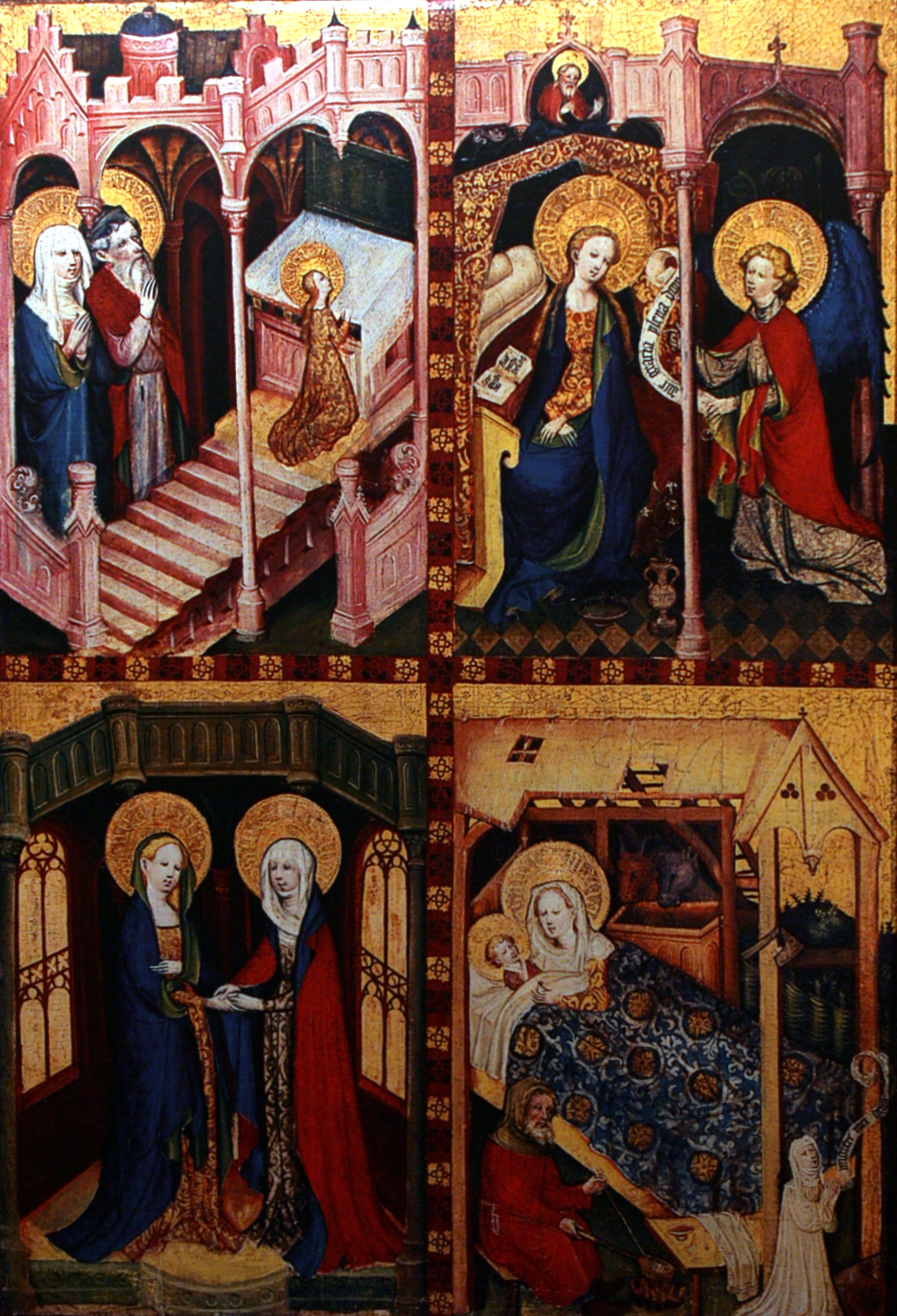 Fröndenberg, Stiftskirche. Marienaltar Links Seite:Maria Tempelgang, Verkündigung, Heimsuchung, Geburt Christi